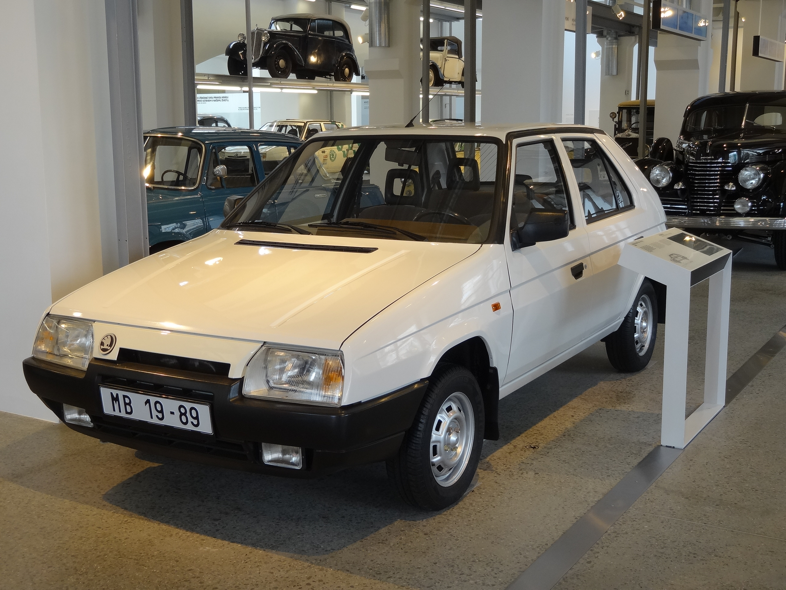 "Die engagierte Skoda-Mannschaft und das italienische Designstudio Bertone trotzen über System- und Sprachgrenzen hinweg der Planwirtschaft: In Rekordzeit entwicklen sie den Favorit. Neben der Schrägheck-Basisversion gibt es einen Pick-up und den Kombi Skoda Forman" (Hinweistafel)